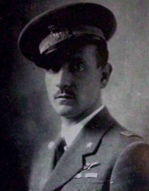 Aviatore decorato con Medaglia d'Oro al Valore Aeronautico